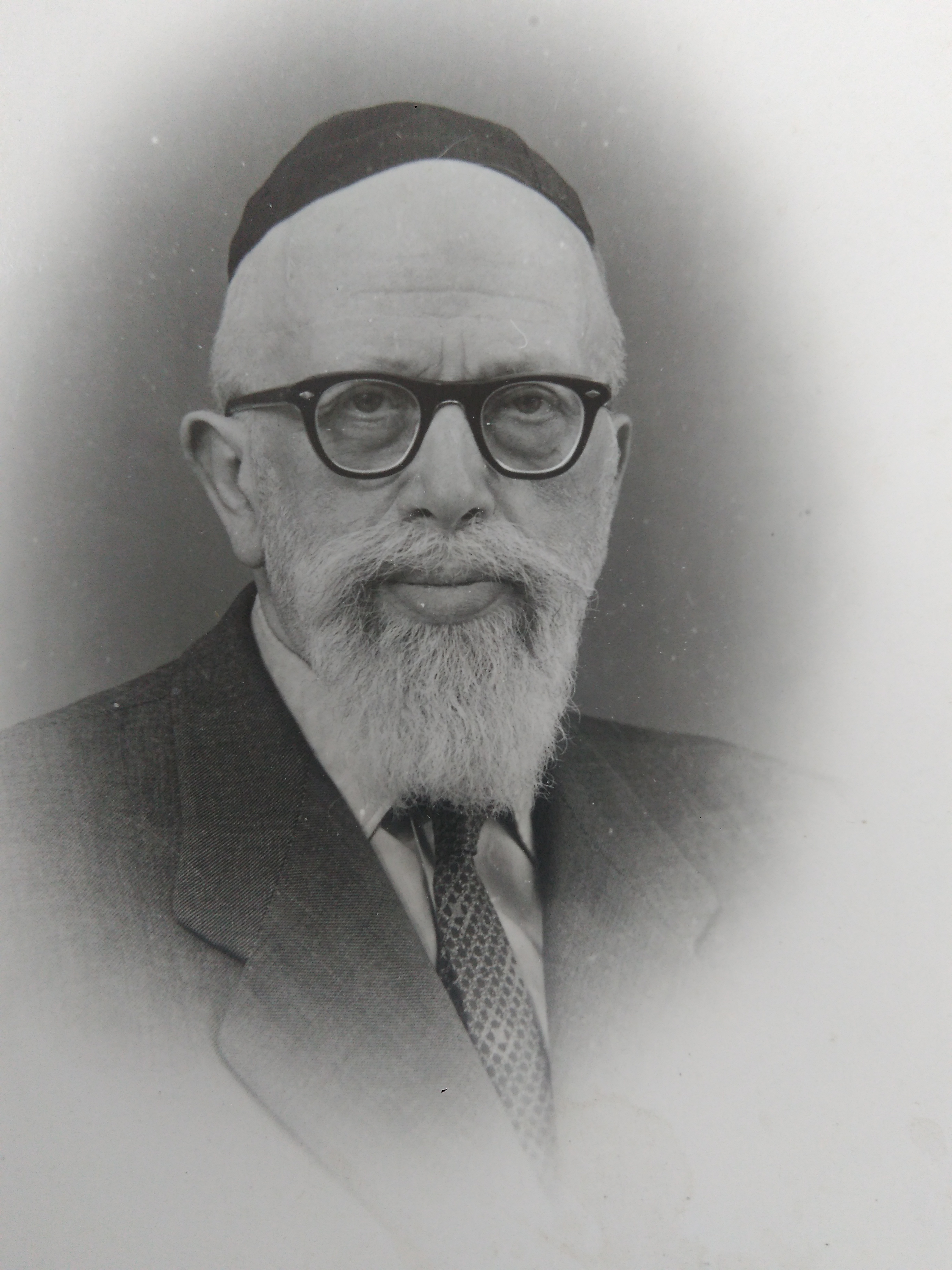 הרב ד"ר שמואל למברגר